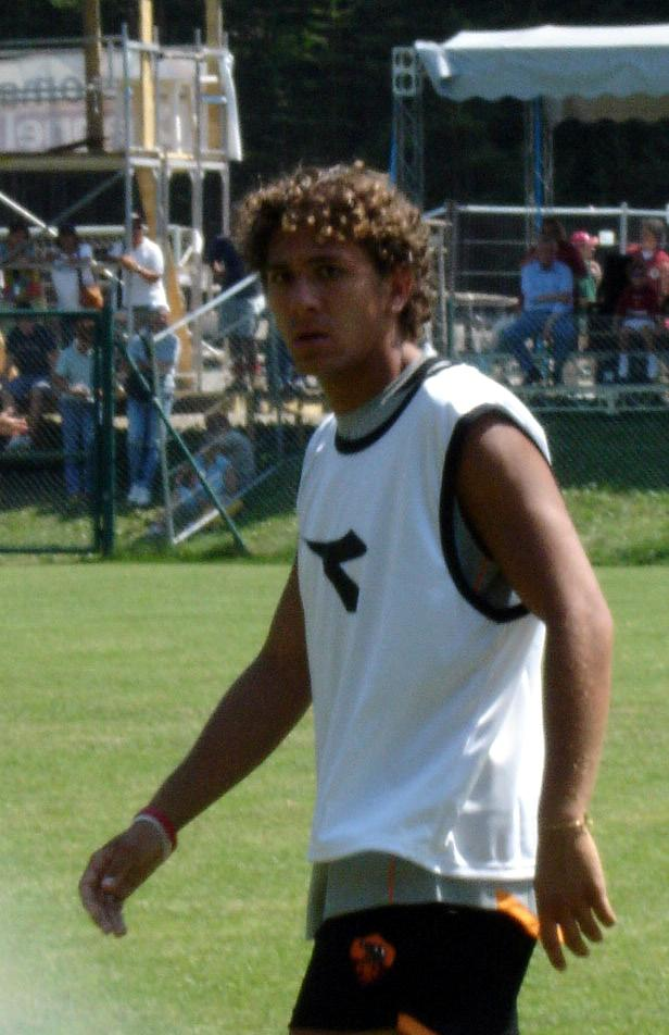 Alessio Cerci, Italian footballer